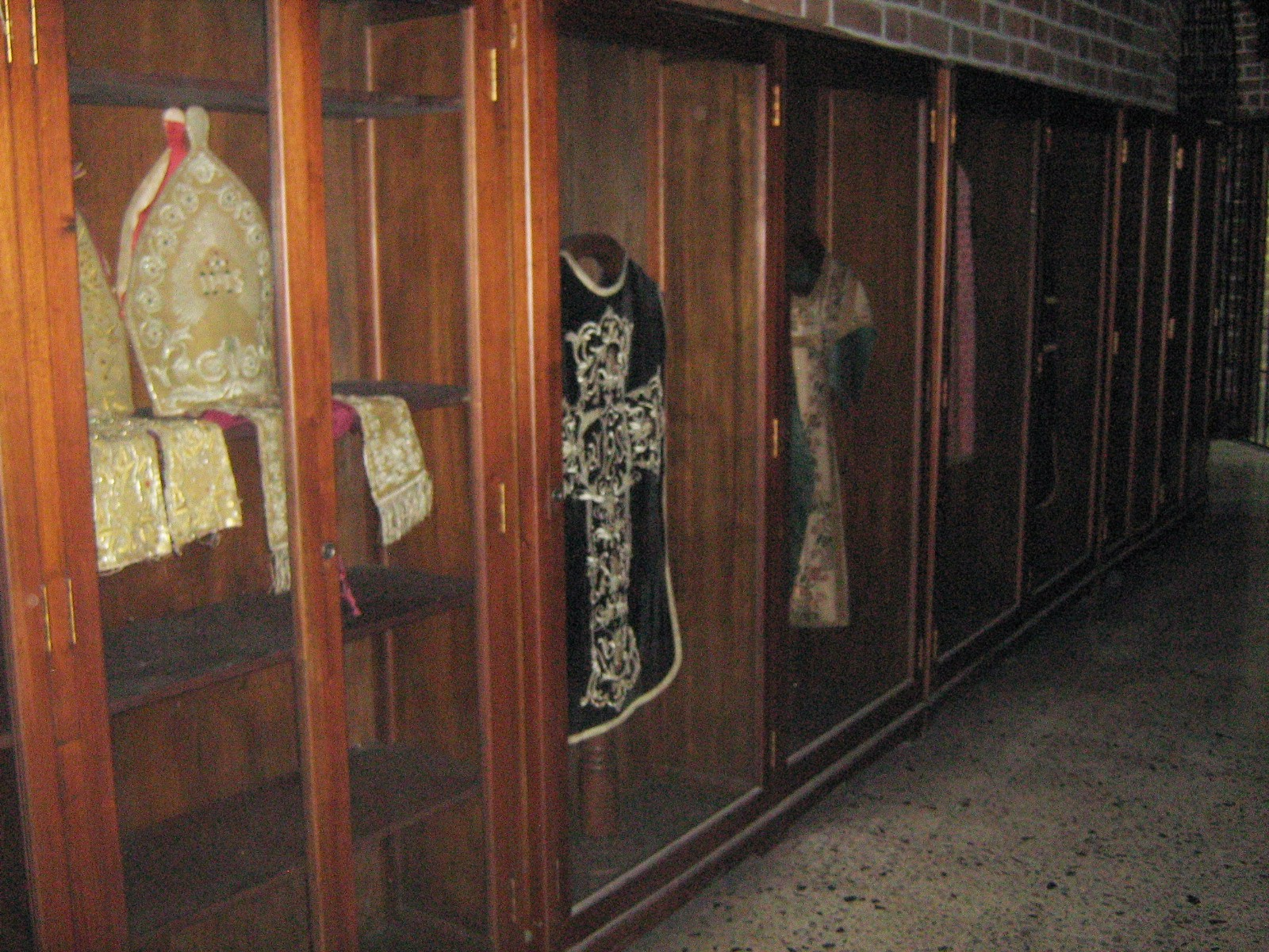 Catedral Metropolitana de Medellín, estante con ornamentos (mitras casullas, dalmáticas, capas pluviales, etc.) ubicado en el pasillo de acceso al museo de arte religioso. Colombia